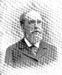 Retrato de Buenaventura Abarzuza, en la revista española Por esos Mundos.